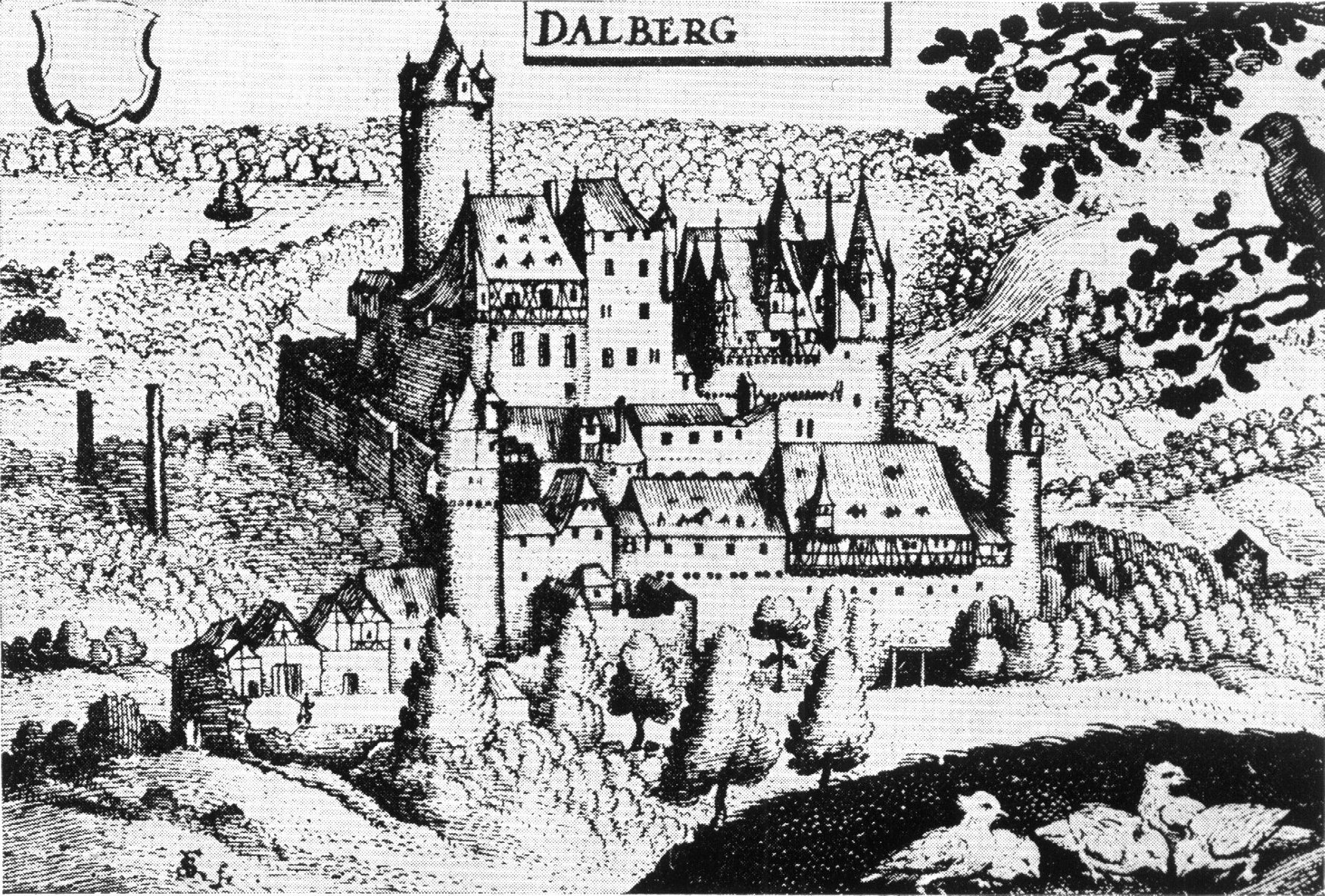 Burg Dalberg, Kupferstich